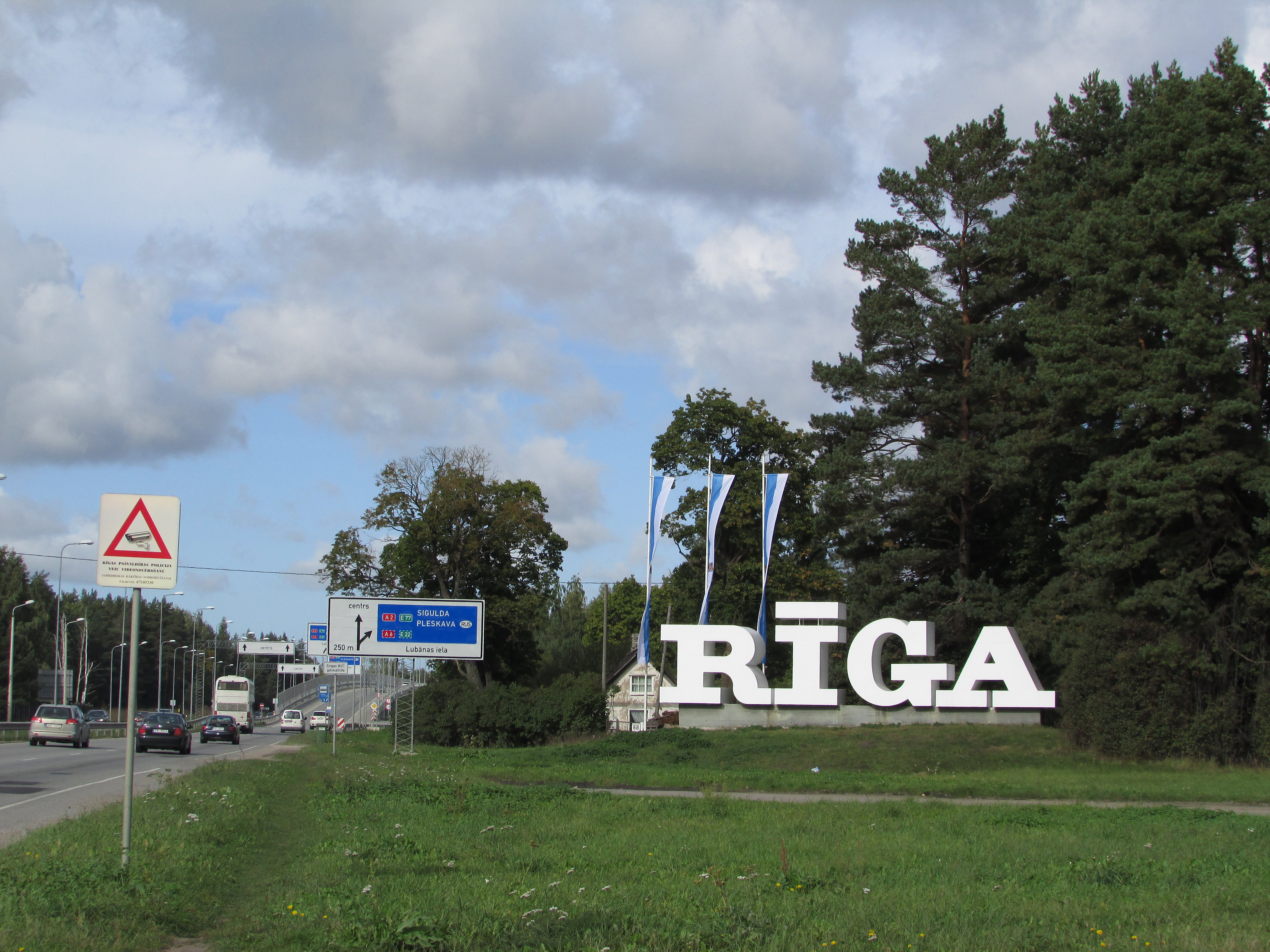 Dizaina objekts robežzīme RĪGA (4), Rīga